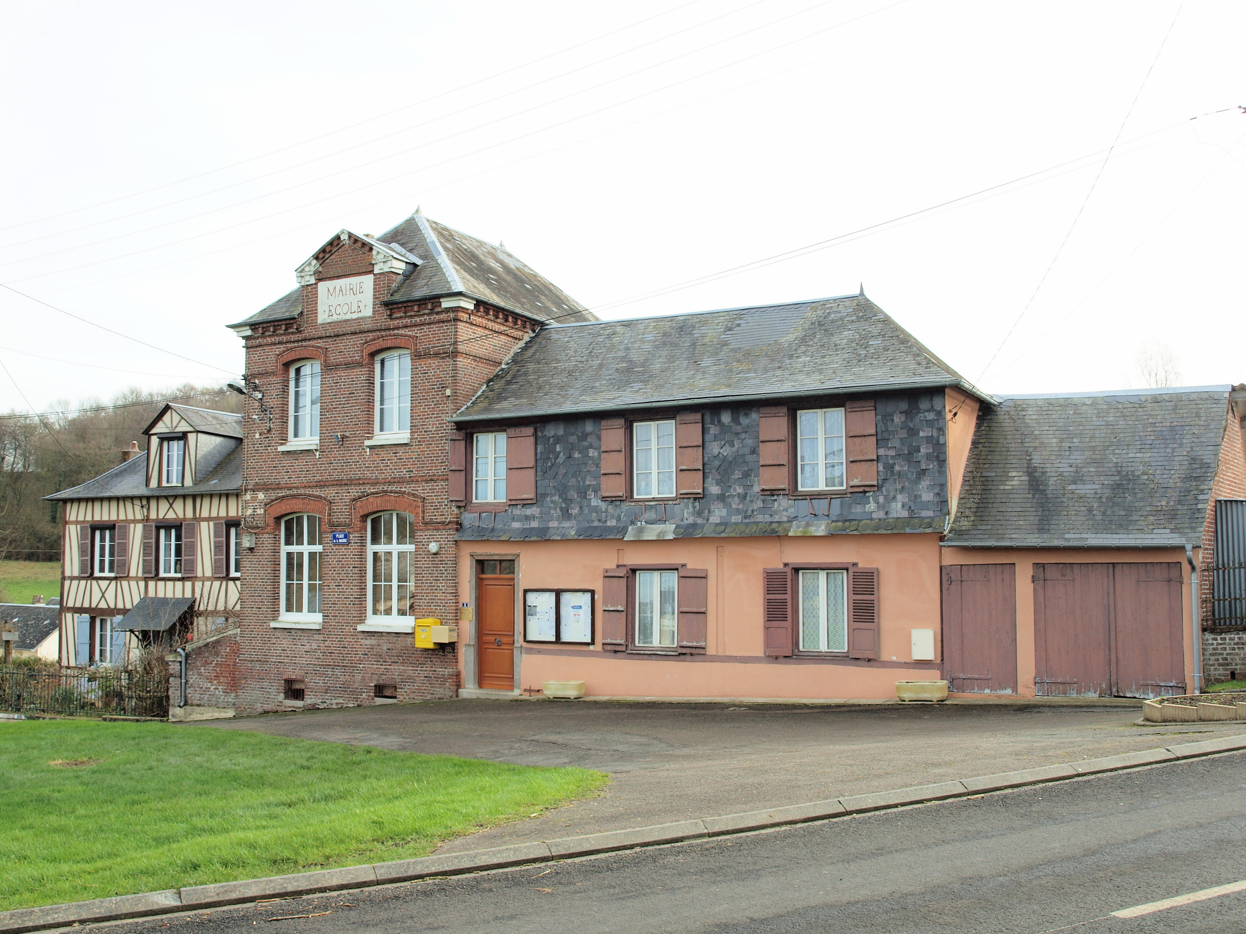 Gourchelles (Oise, France)